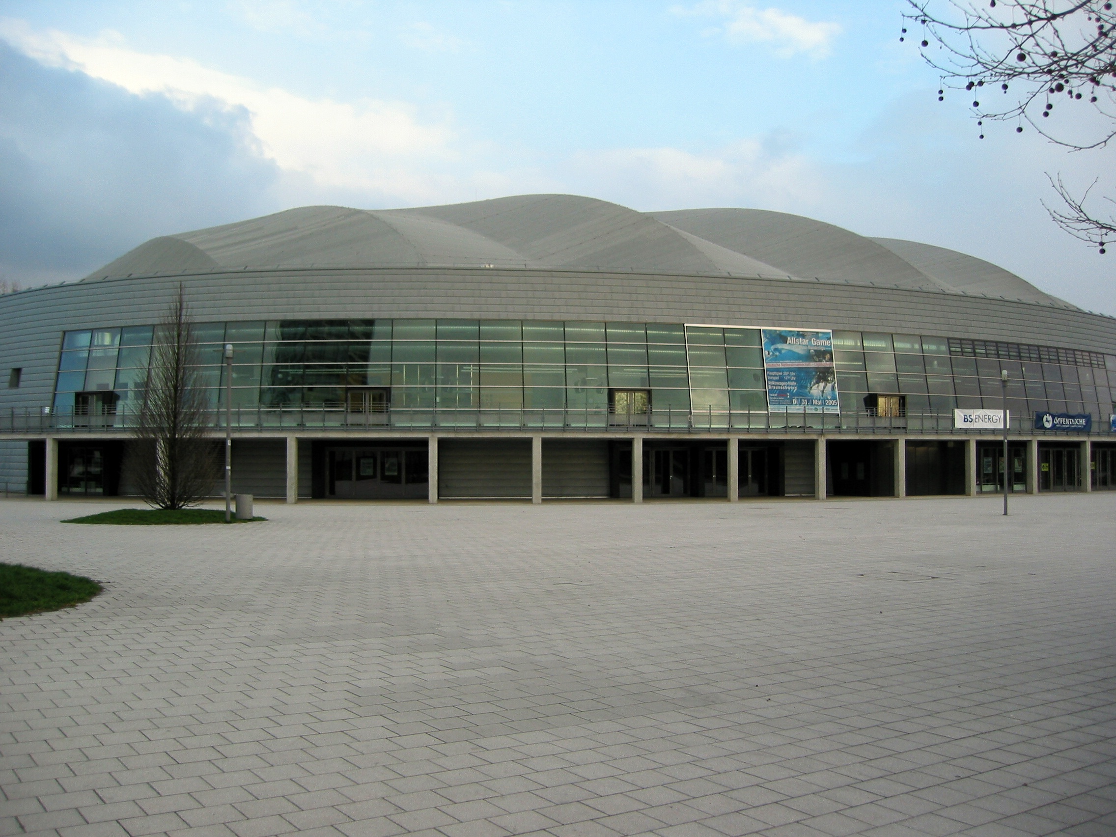 Braunschweig, Volkswagenhalle